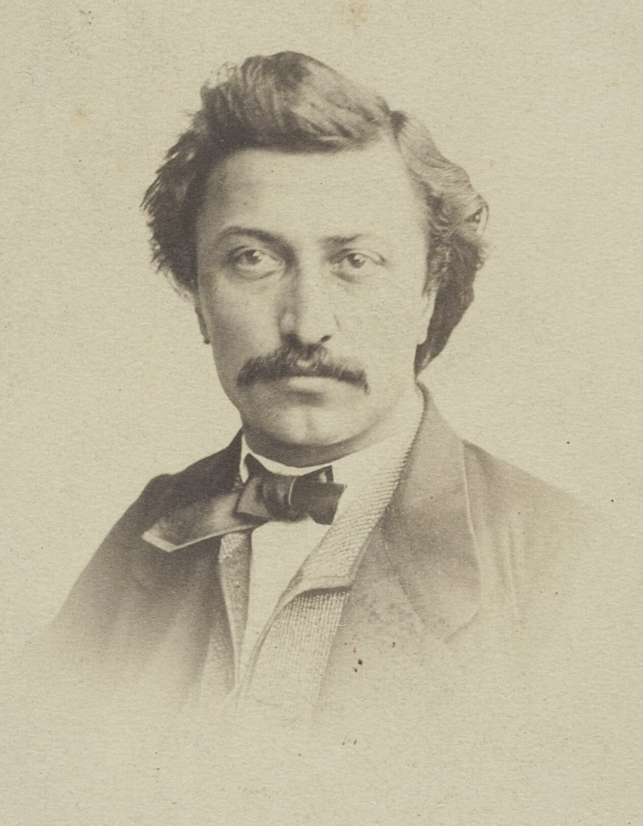 Adam Miłaszewski, ok. 1870 r.